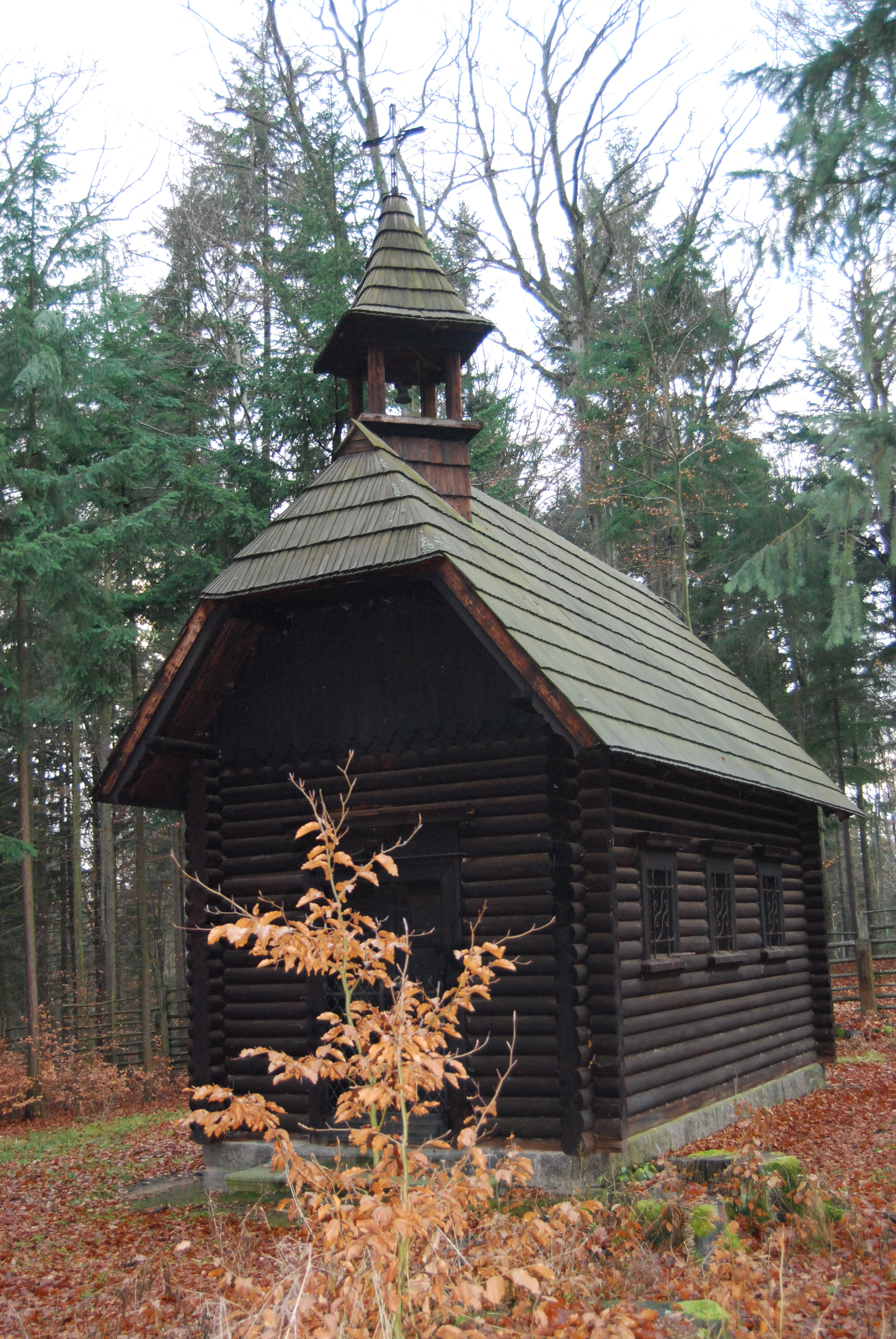 Kaple svatého Huberta z roku 1903 v areálu obory. Rukávečská obora, zvaná též Květovská obora. Rukáveč - část města Milevsko v okrese Písek. Česká republika.